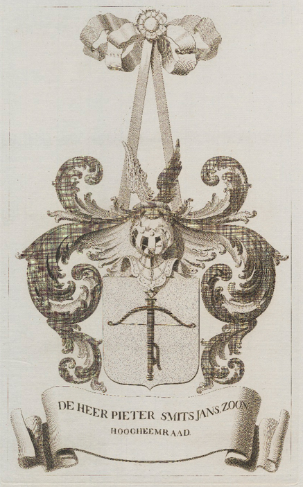 Wapen Pieter Janszoon Smits (1767-1859) op een kaart van het Hoogheemraadschap Krimpenerwaard